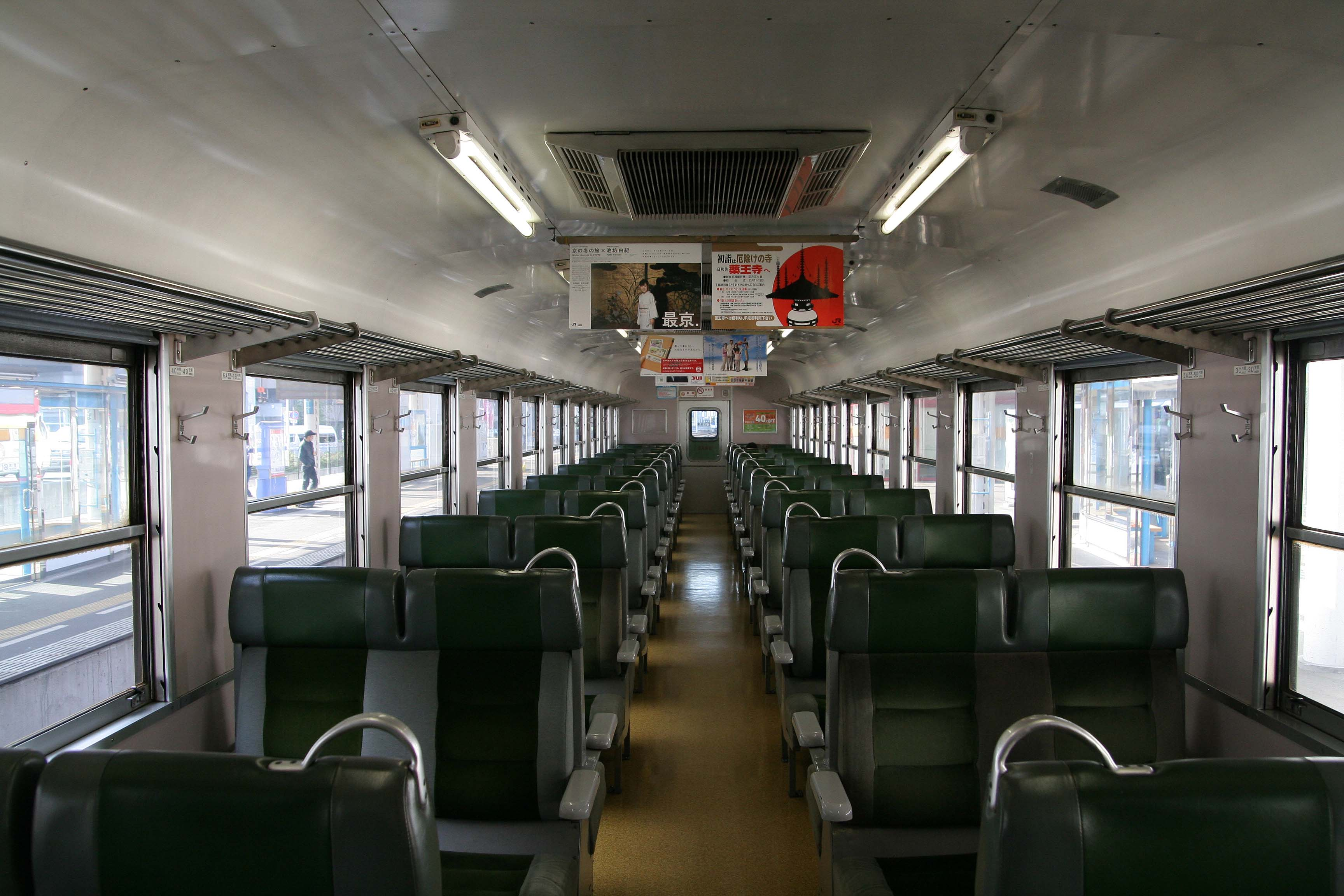 JR四国キハ65形34の車内（ボックス席）